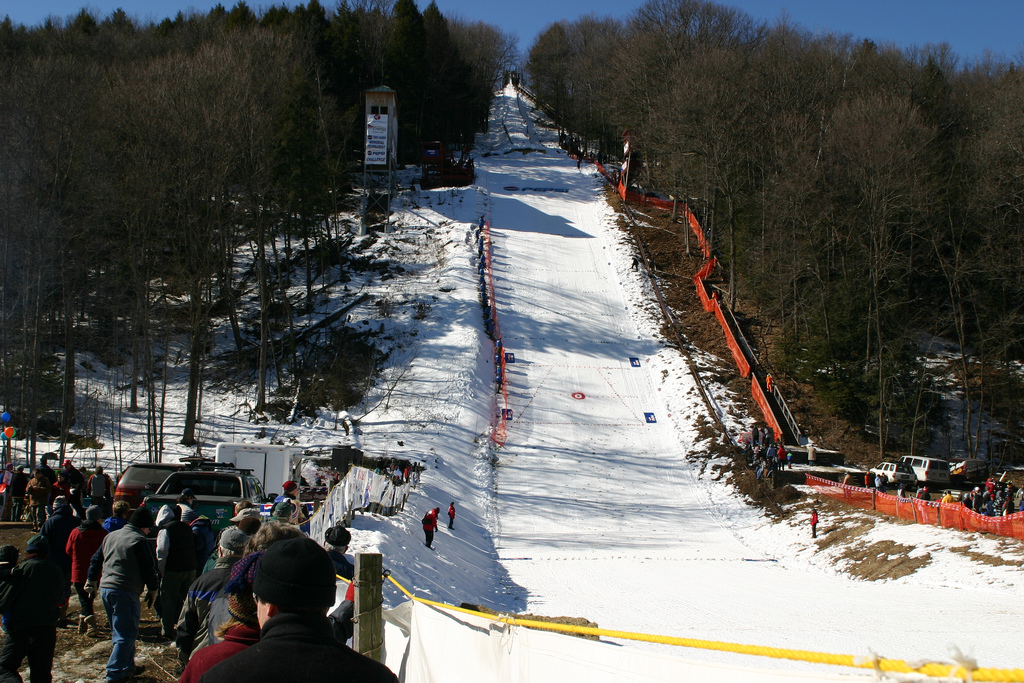 Harris Hill ski jumping hill, Brattleboro